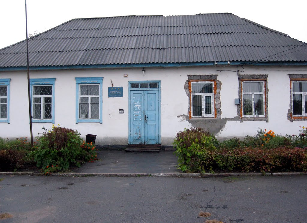 Будинок Білецьківської сільської ради, Полтавська область